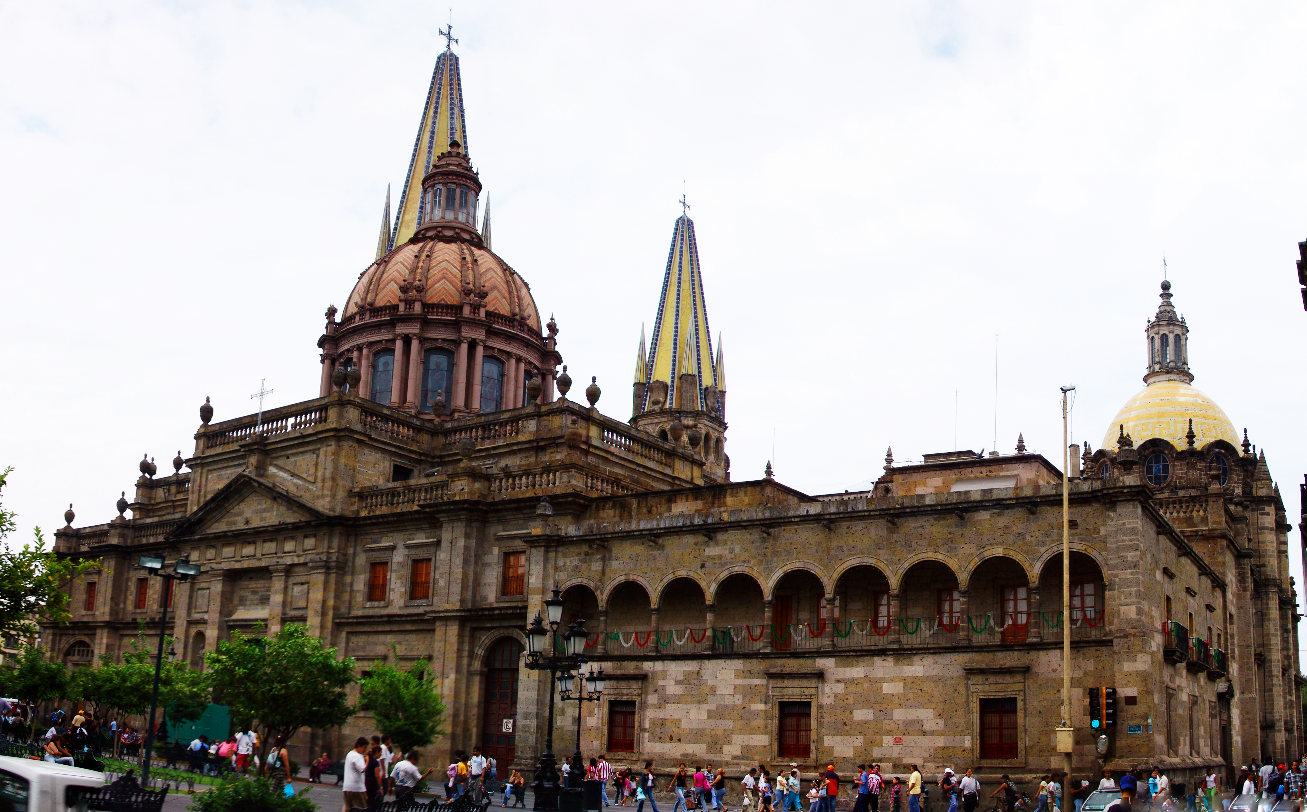 Catedral es uno de los símbolos más representativos de la ciudad. Inició su construcción en 1551 y se terminó en 1618. Es famosa por su arquitectura ecléctica donde el dórico y gótico marcan su influencia. Esta es una vista desde el Palacio de Gobierno, por la avenida Morelos, donde se aprecia el bautisterio con su cantera rosa.